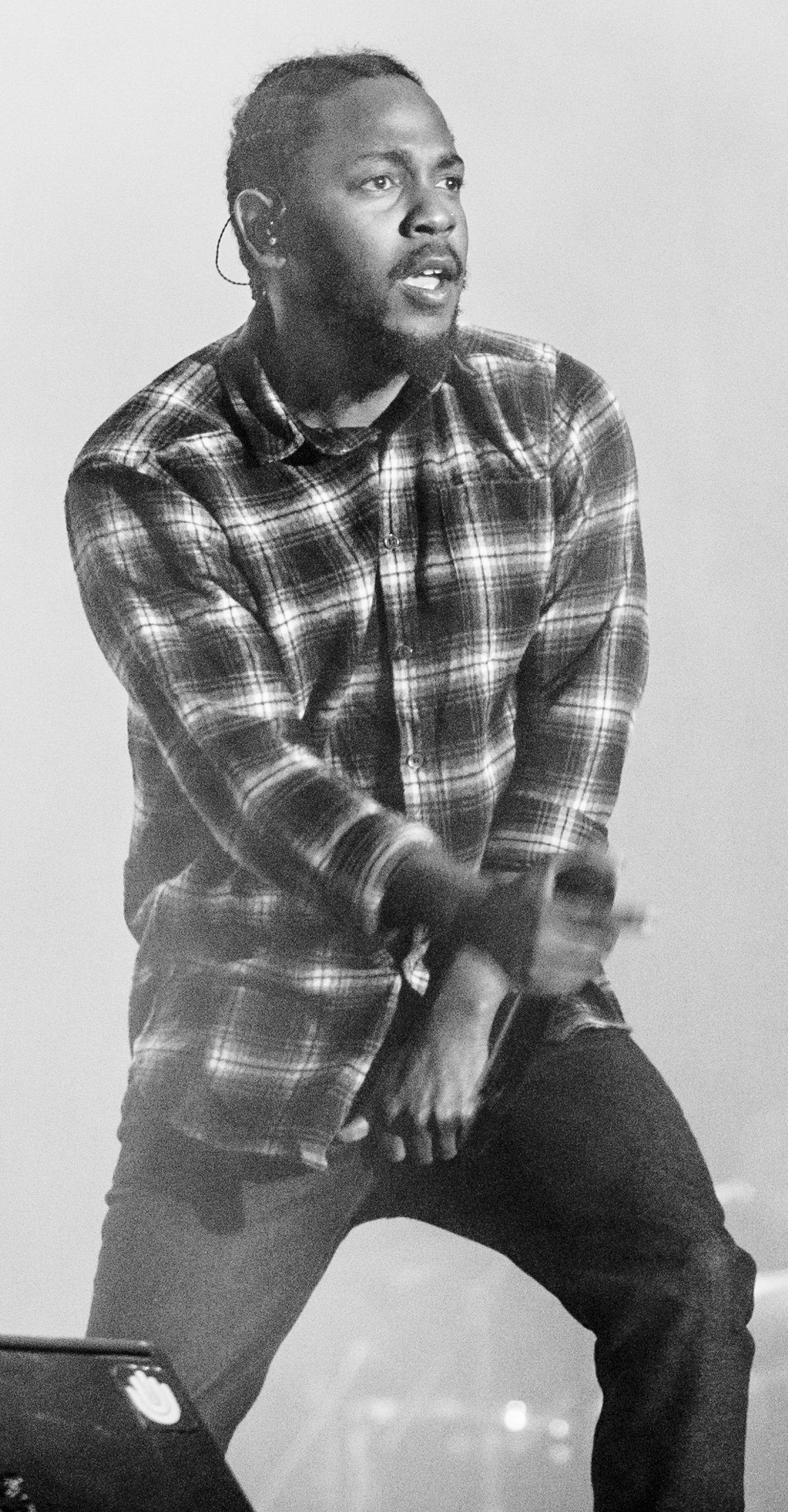 F.I.B. 2016